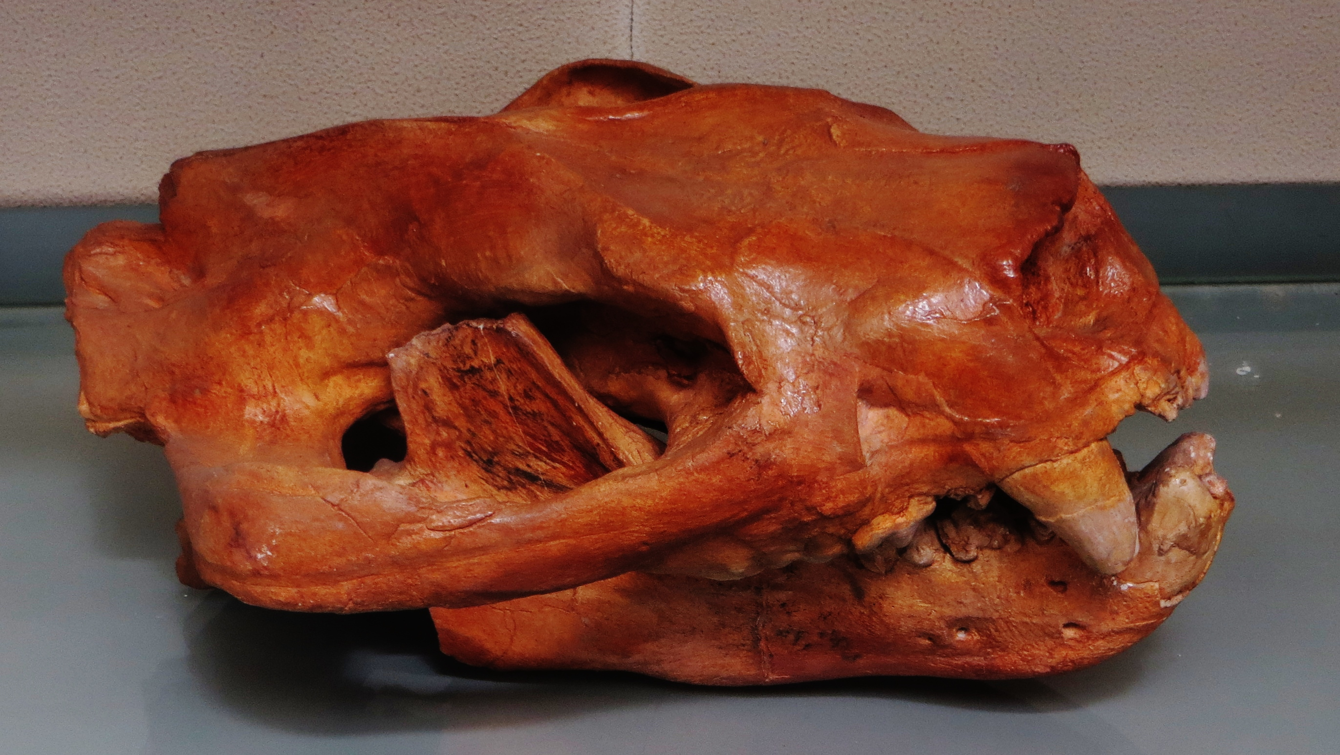 Fossil of Patriofelis, an extinct mammal - Took the photo at Musee d'Histoire Naturelle, Paris